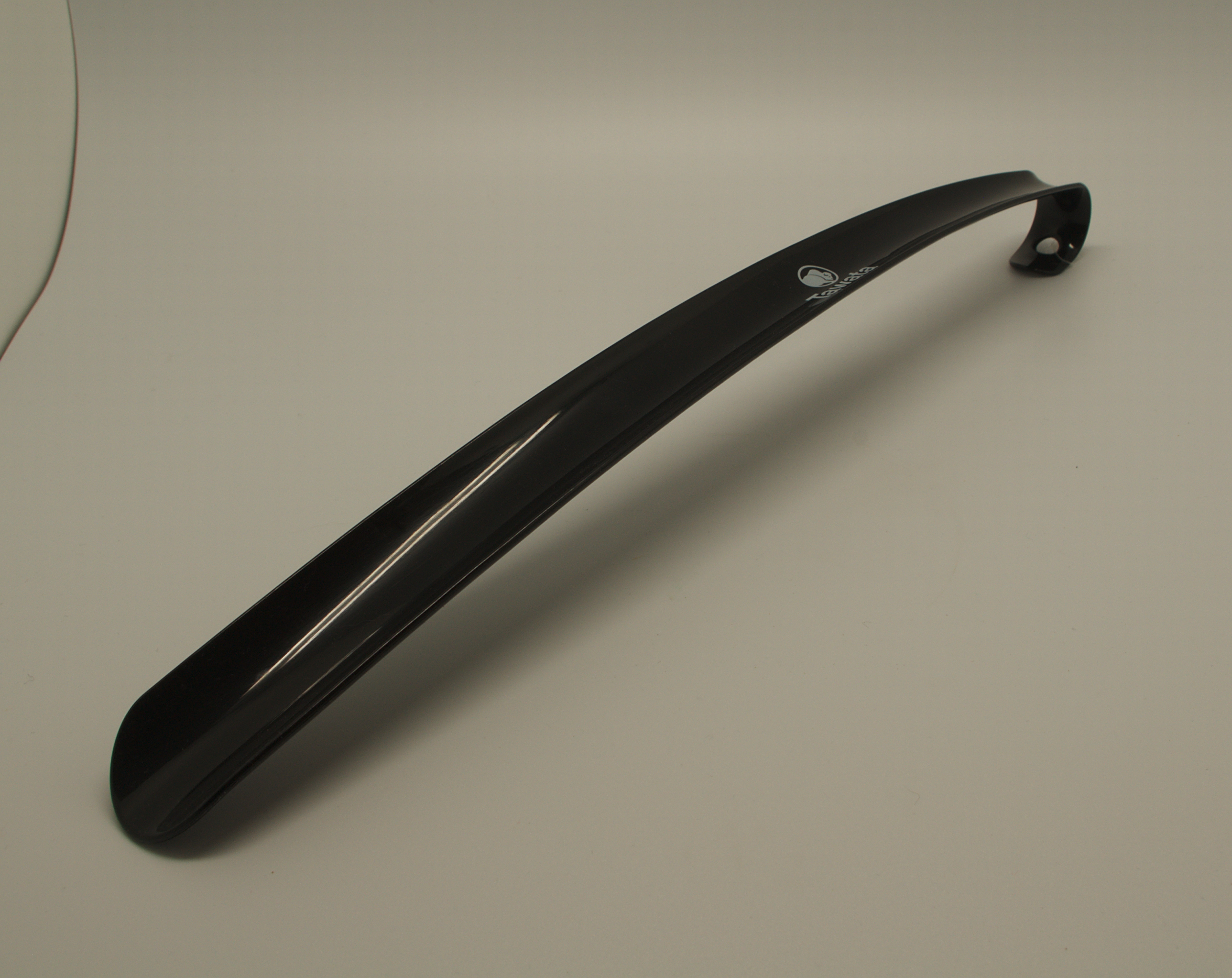 Chausse-pied à long manche en plastique noir